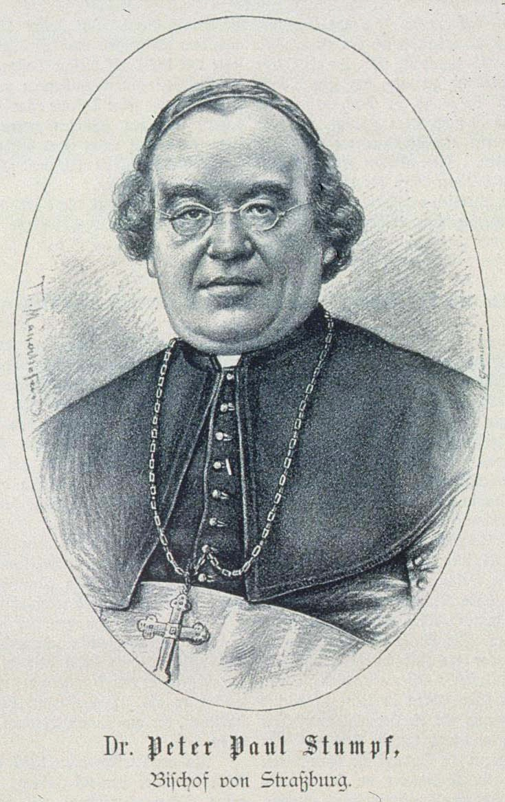 Peter Paul Stumpf (1822-1890), Bischof von Straßburg, Elsass